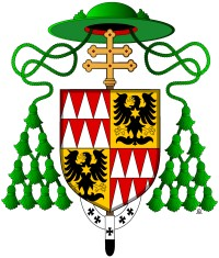 Znak arcibiskupa Antonína Stojana